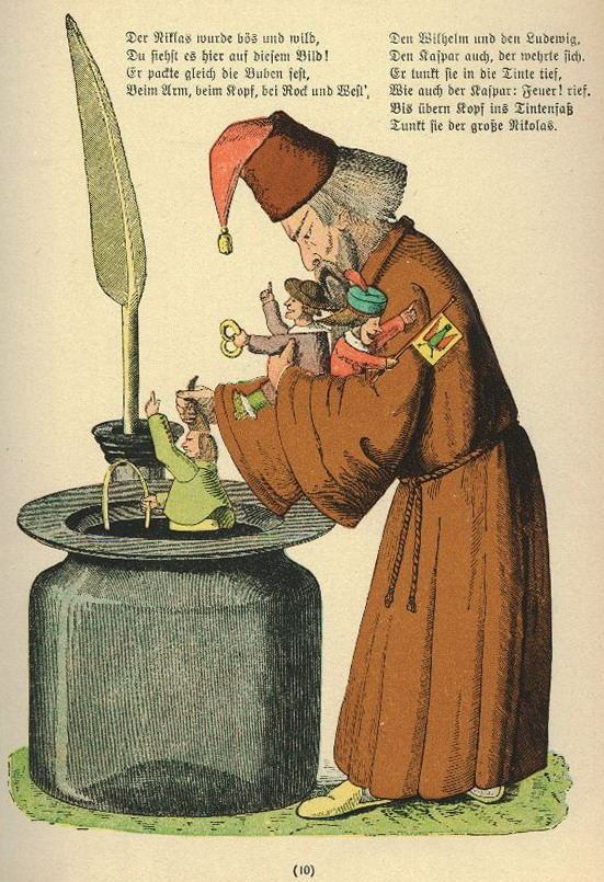 Der Struwwelpeter: Die Geschichte von den schwarzen Buben Tafel 3